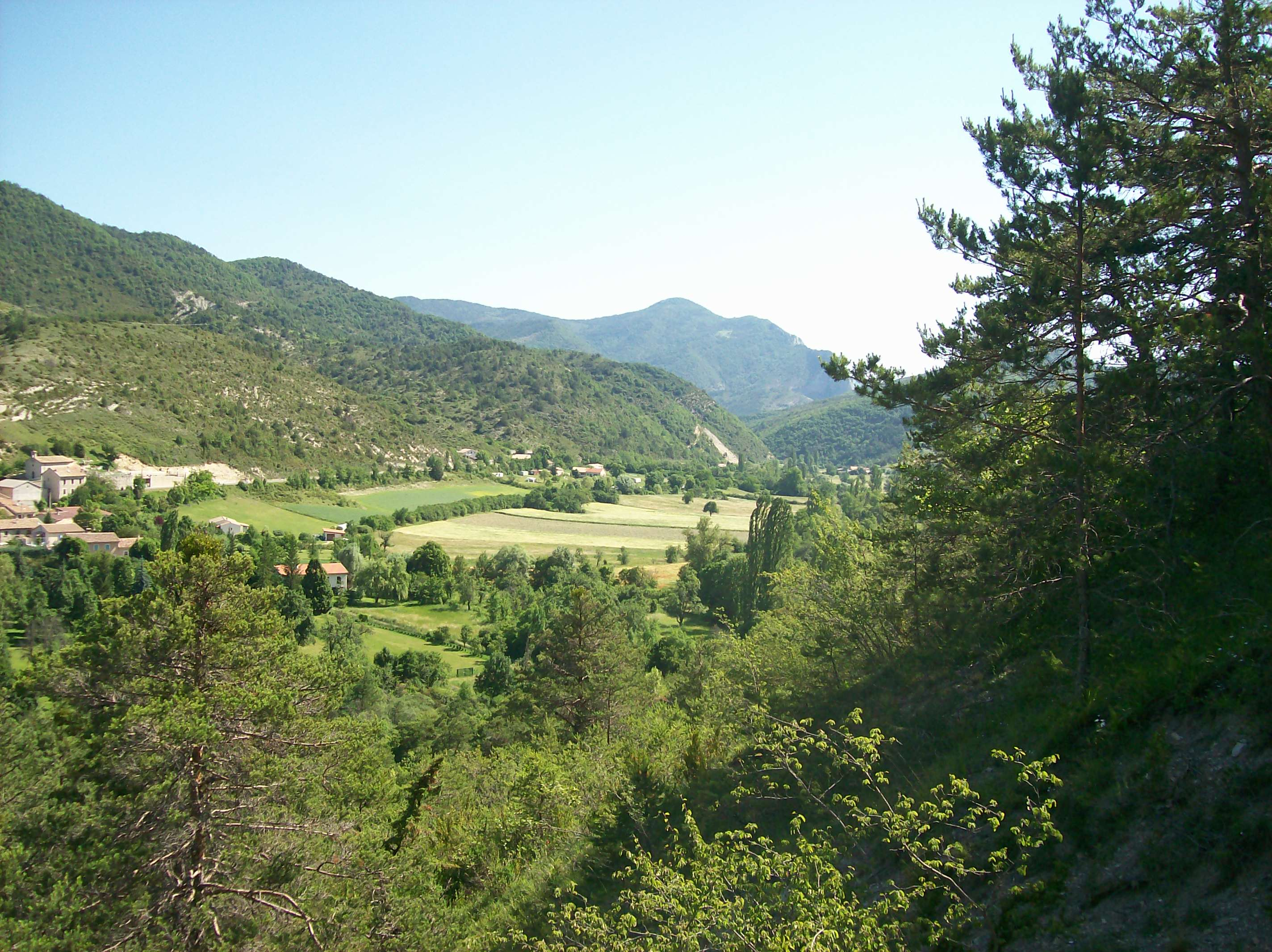 vue générale de la vallée du Céans en amont d'Orpierre (Hautes-Alpes)